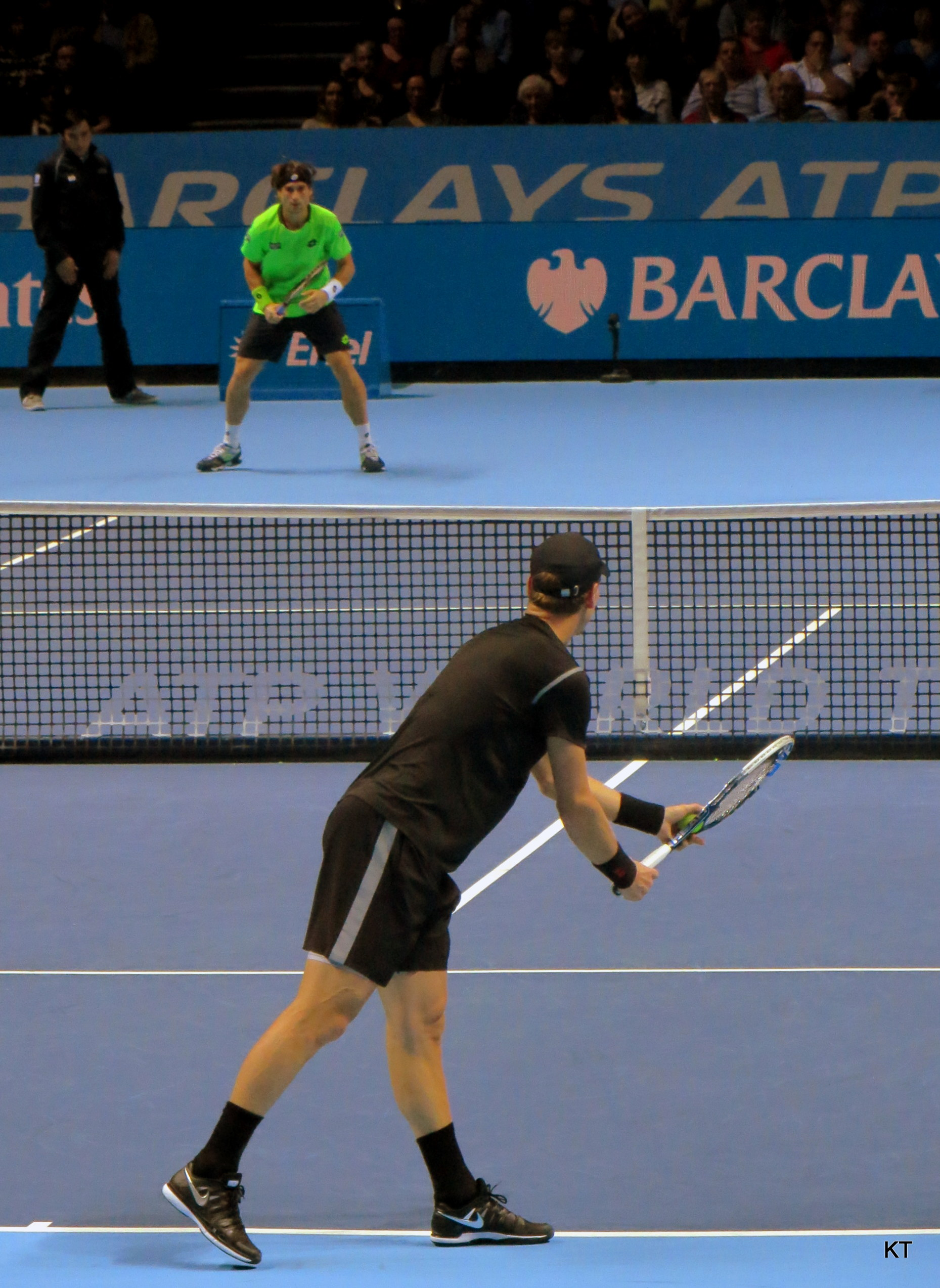 Tomas Berdych v David Ferrer